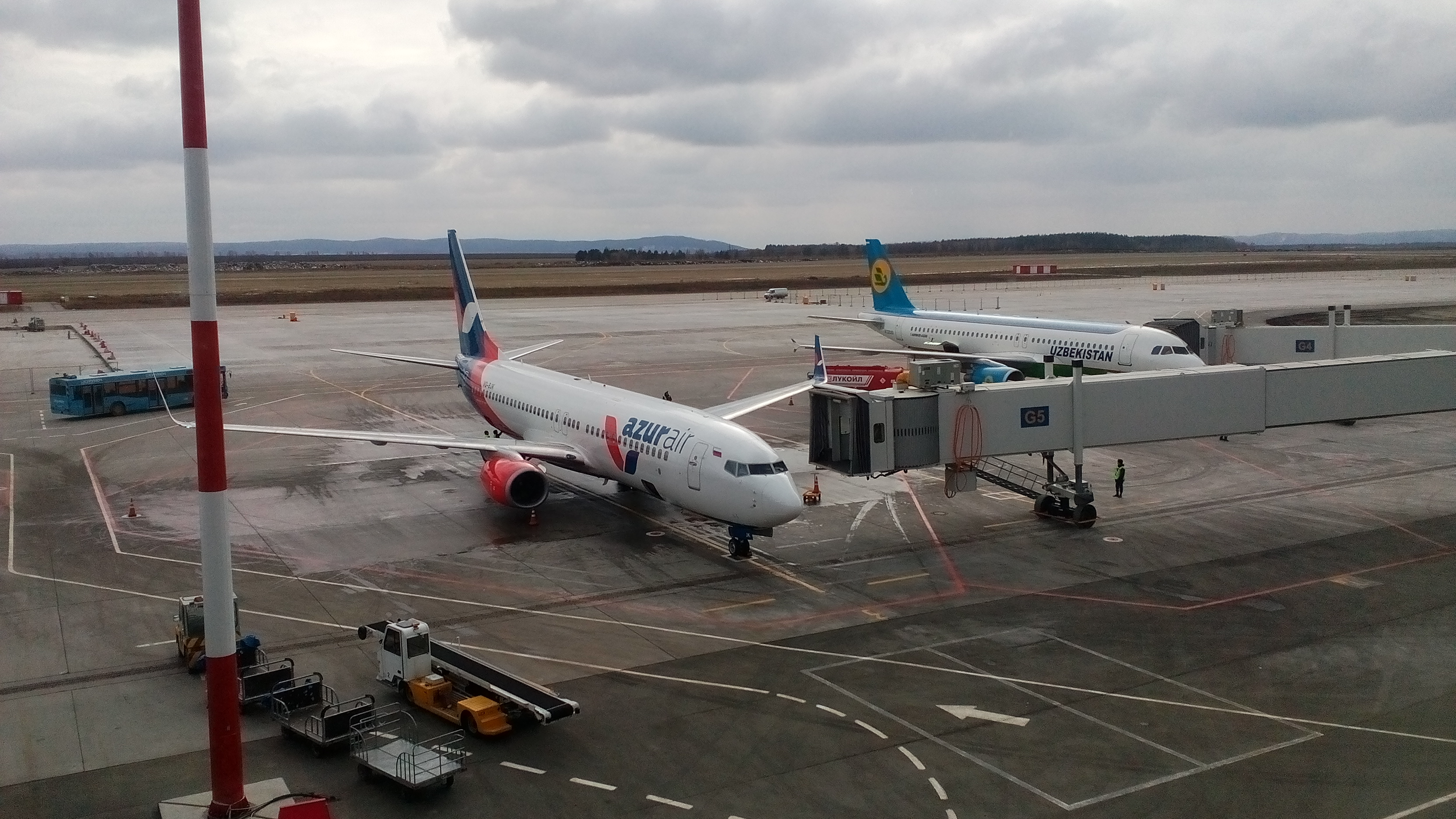 Самолёт AzurAir в Самаре